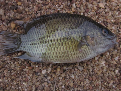 Parambassis thomassi, location: Chakravani, Pariyaram, Chalakudy, India.